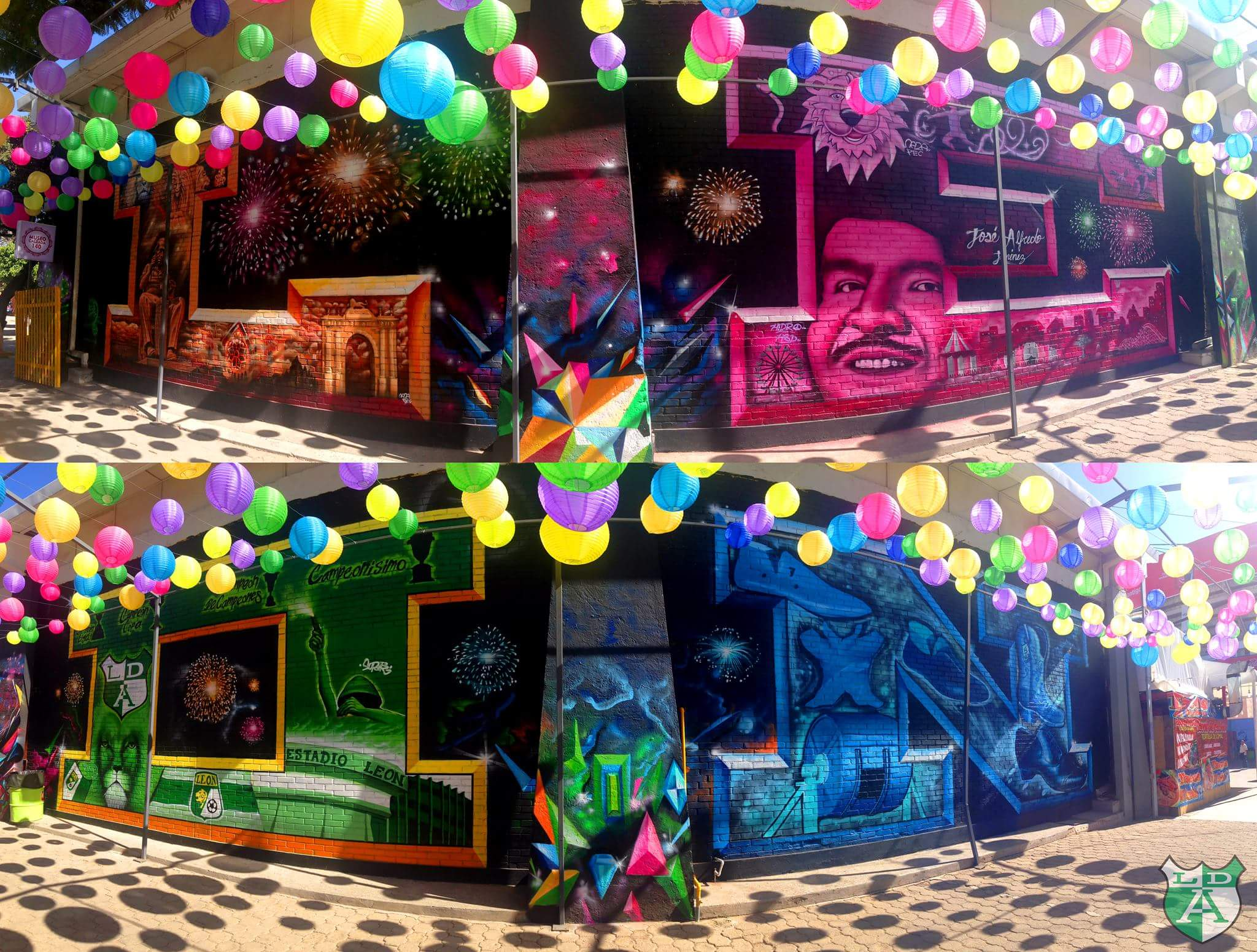 La barra y varios artistas de la ciudad pintan aspectos esenciales de la ciudad